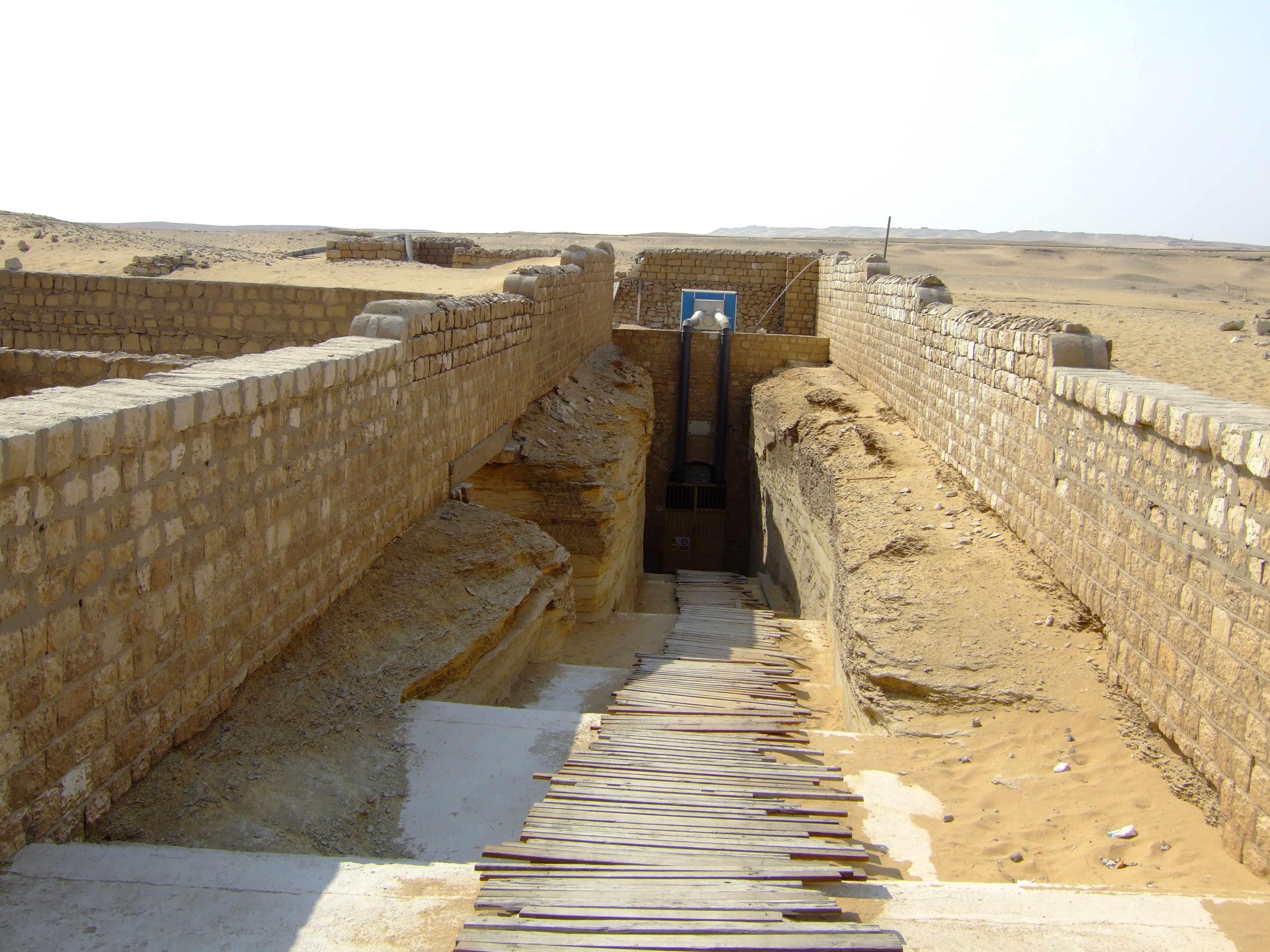 Saqqara (Egitto) Ingresso al Serapeo